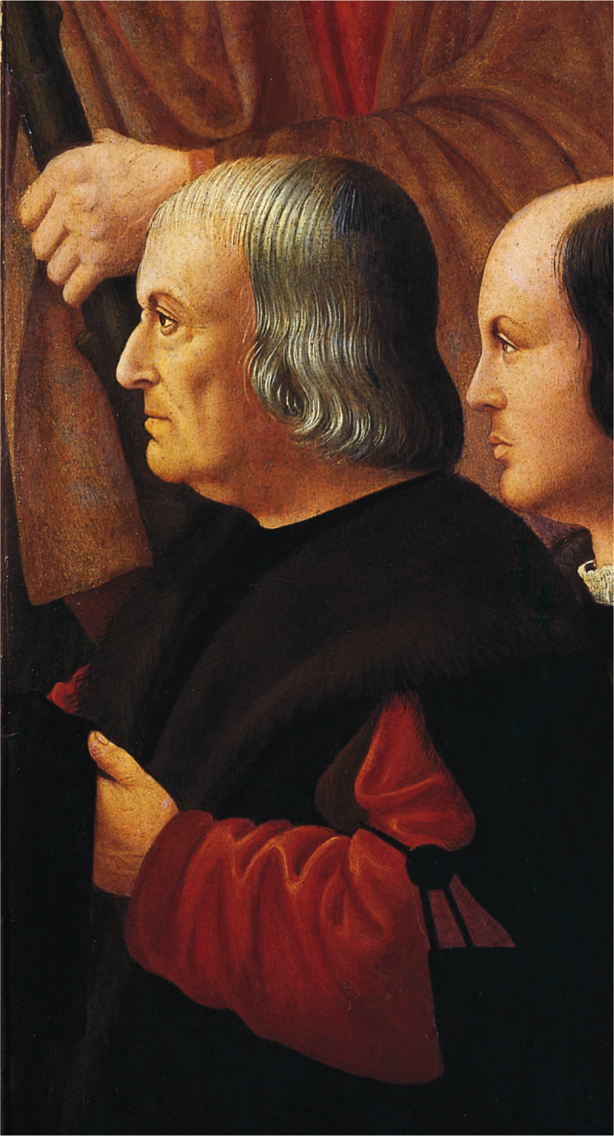 Ritratto di Sebastiano Ferrero, particolare della pala opera di Bernardino de' Conti conservata a Palazzo La Marmora a Biella